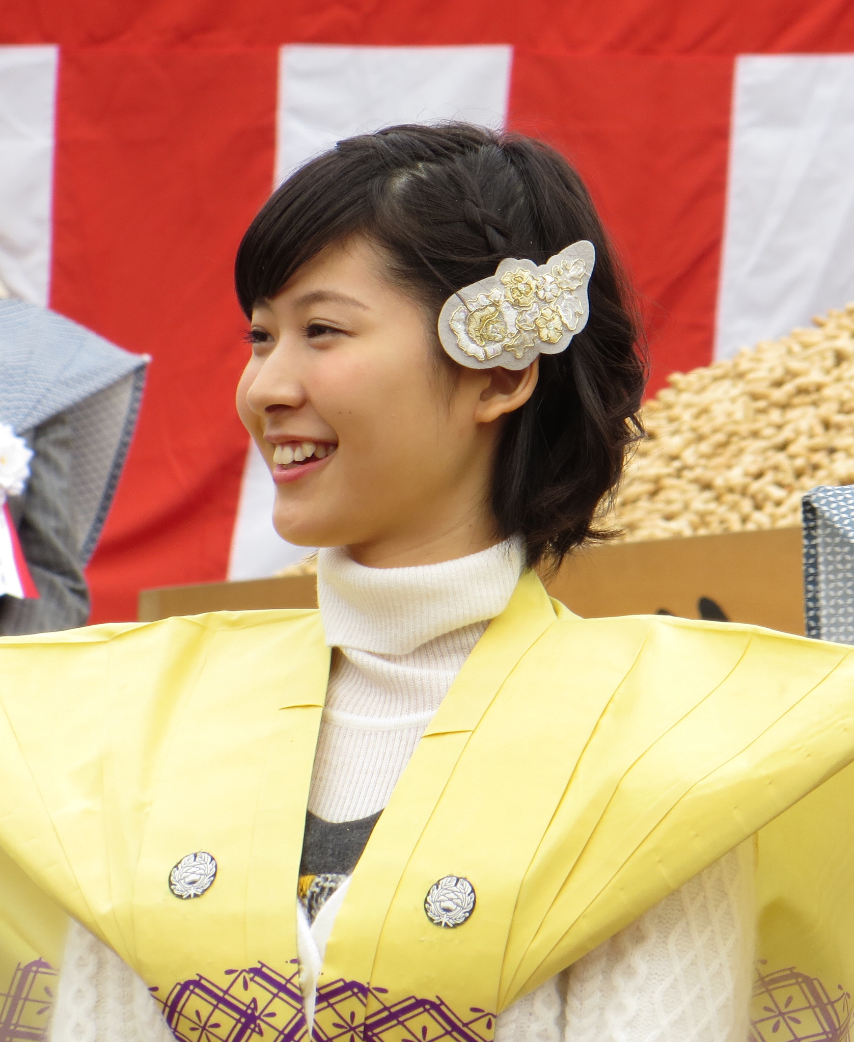 松井に桂文福の眼差しwww